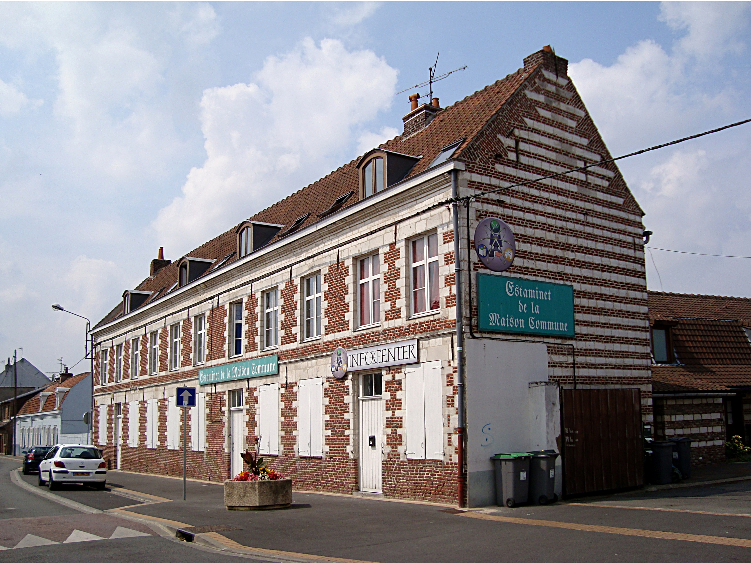 L'estaminet de la maison commune à Emmerin (Nord).